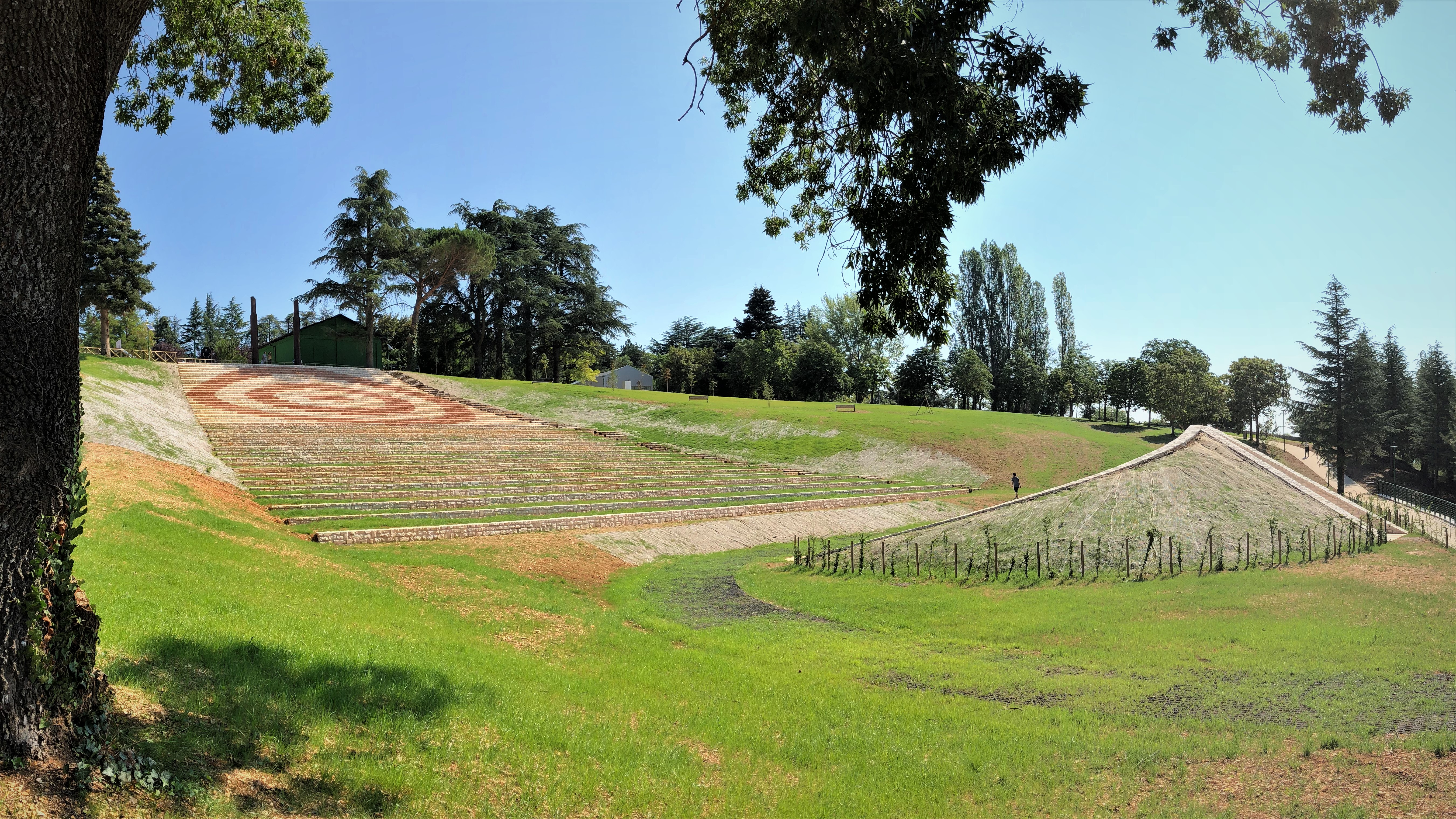 Visuale dell'Amphisculpture (L'Aquila) dal basso.